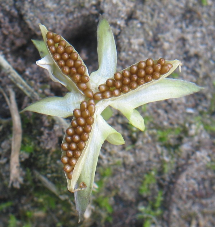 zelfgemaakte foto van opengsrongen vrucht van het Akkerviooltje; half juli